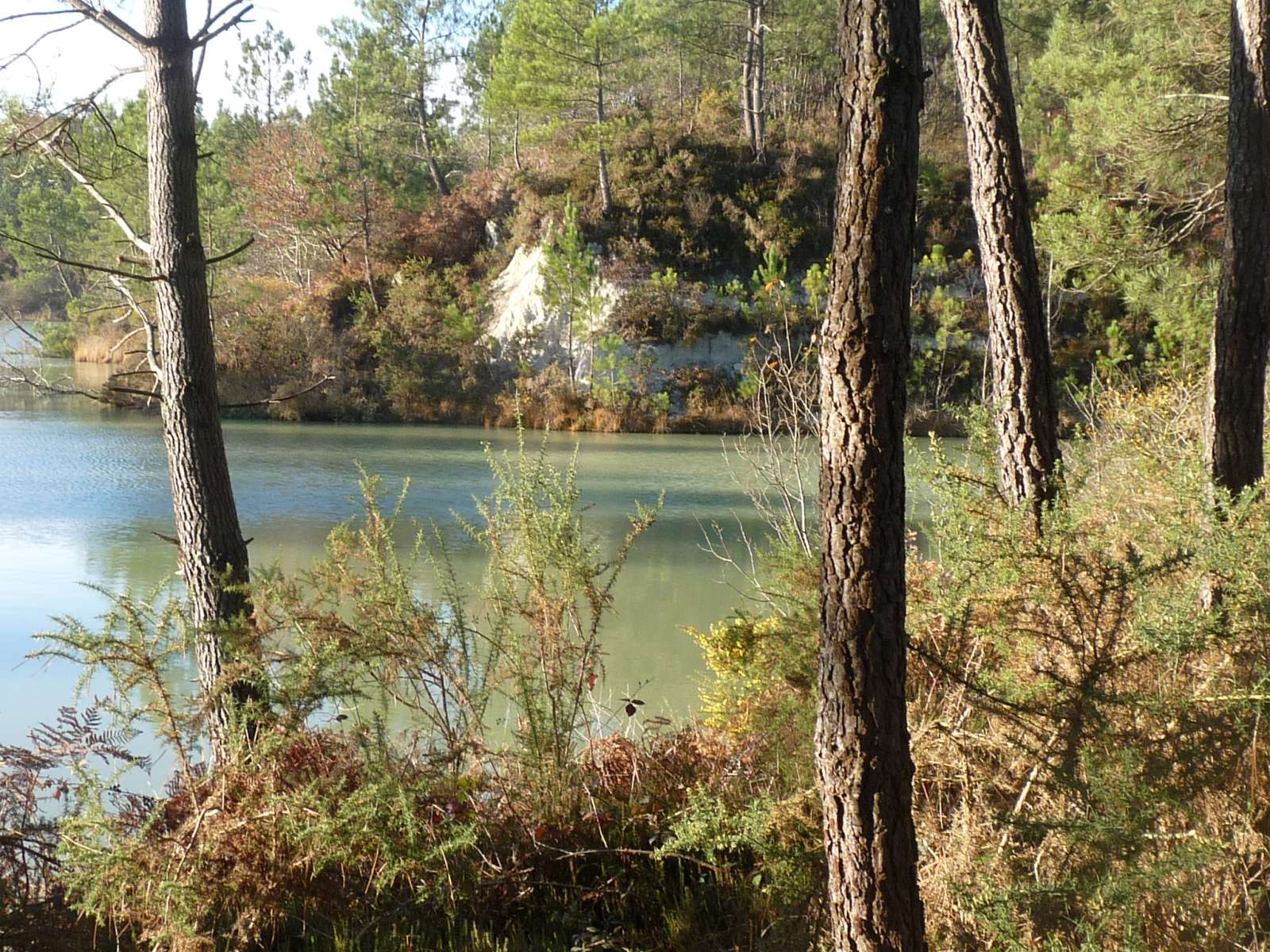 anciennes carrières des landes de Touvérac, Charente, France